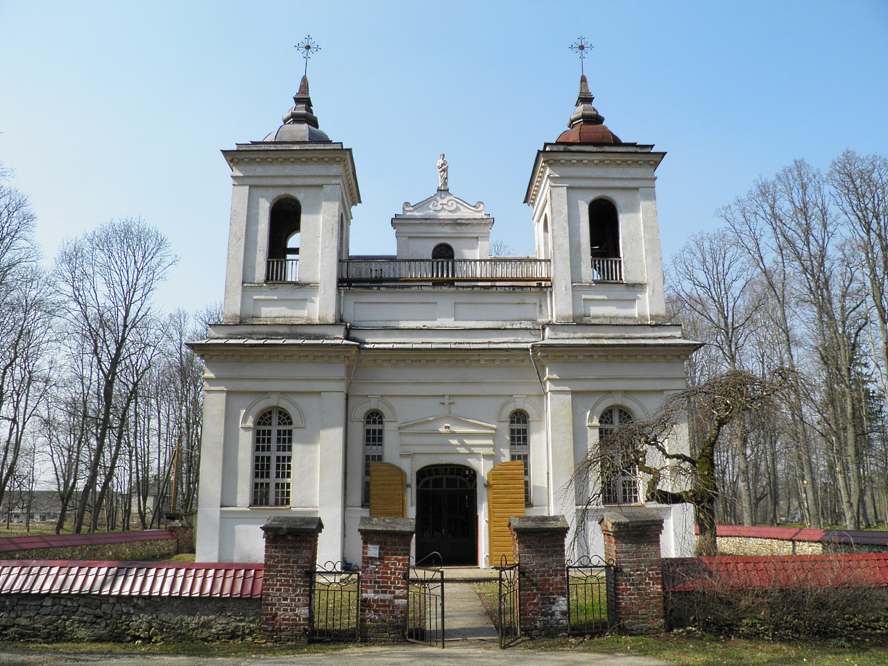 Kurmenes baznīca (2)